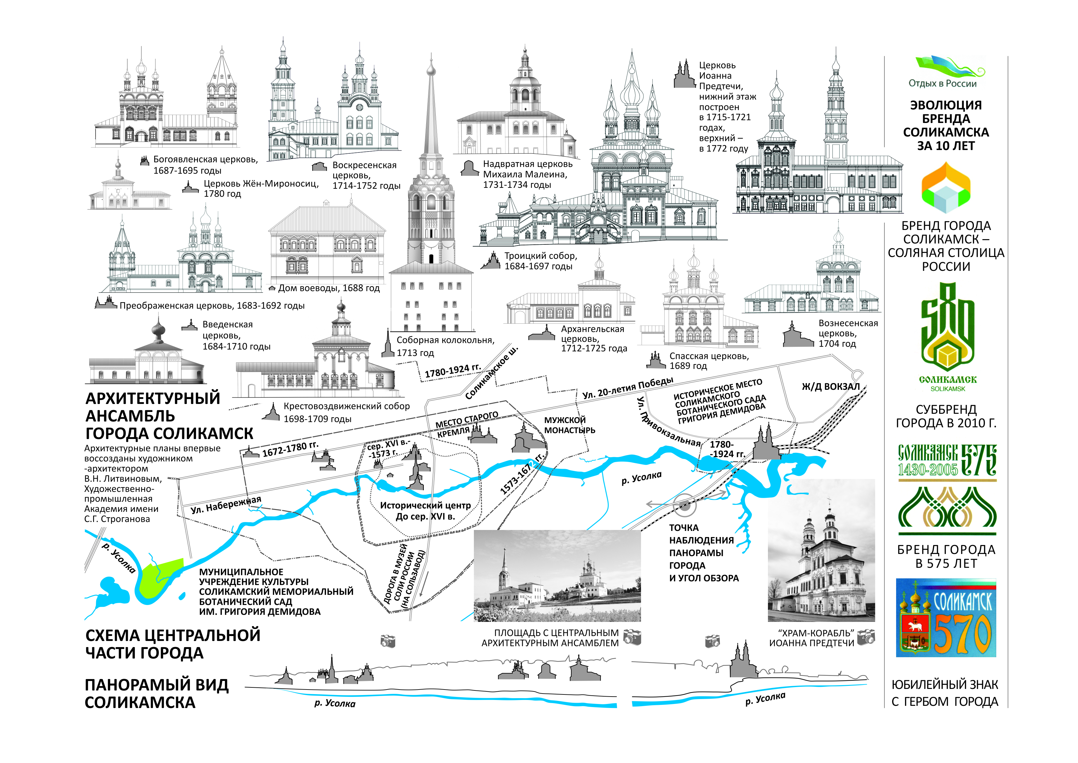 Источник: Литвинов Н.Н. Бренд-стратегия территорий. Алгоритм поиска региональной идентичности (часть 2) // Бренд-менеджмент. — 2010. — №5(54). — С. 309.